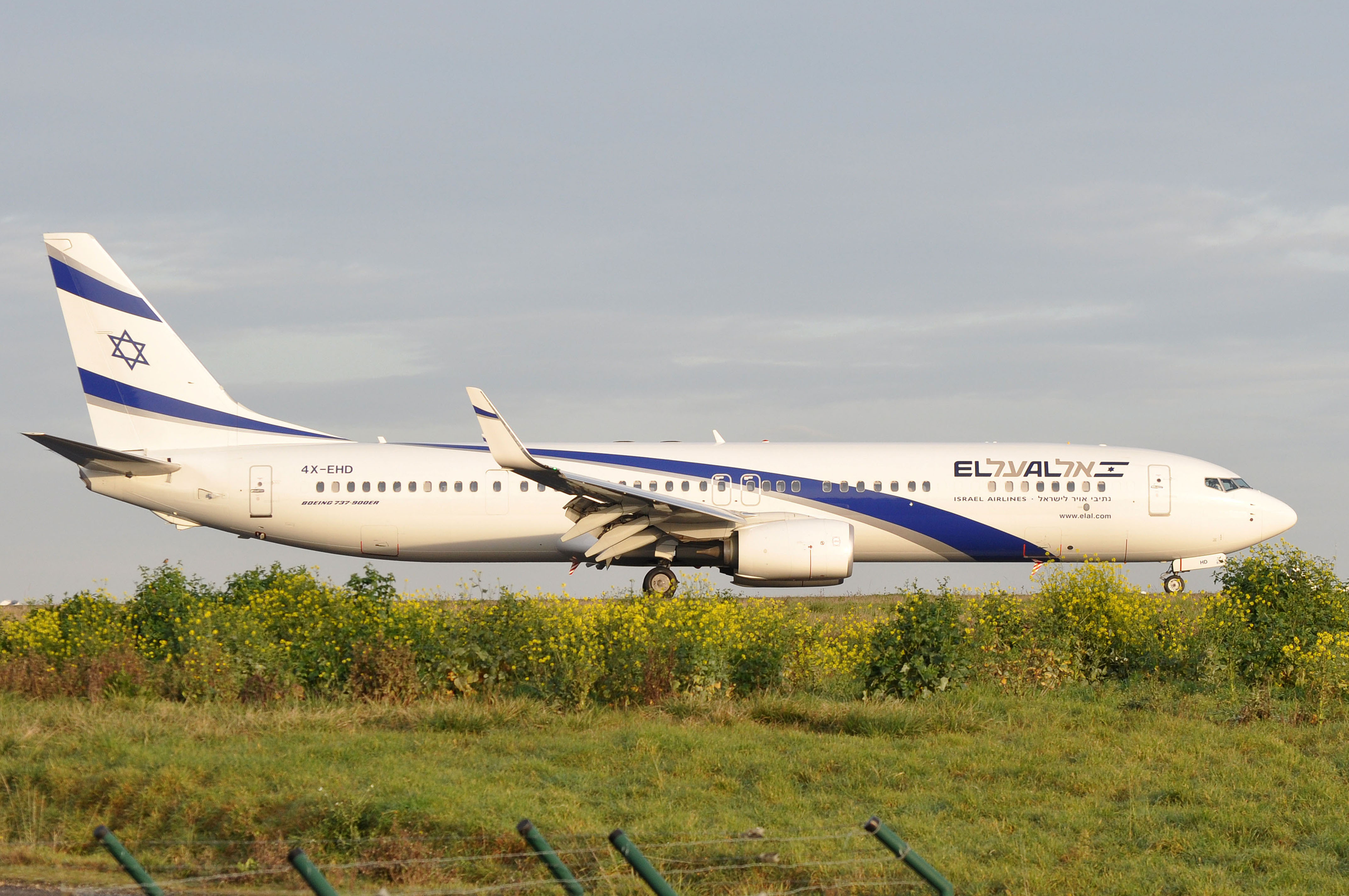 MSN 41555 LN 5311 B737-958ER / 737 / 737-900 / 737-900ER EL AL CDG AIRPORT